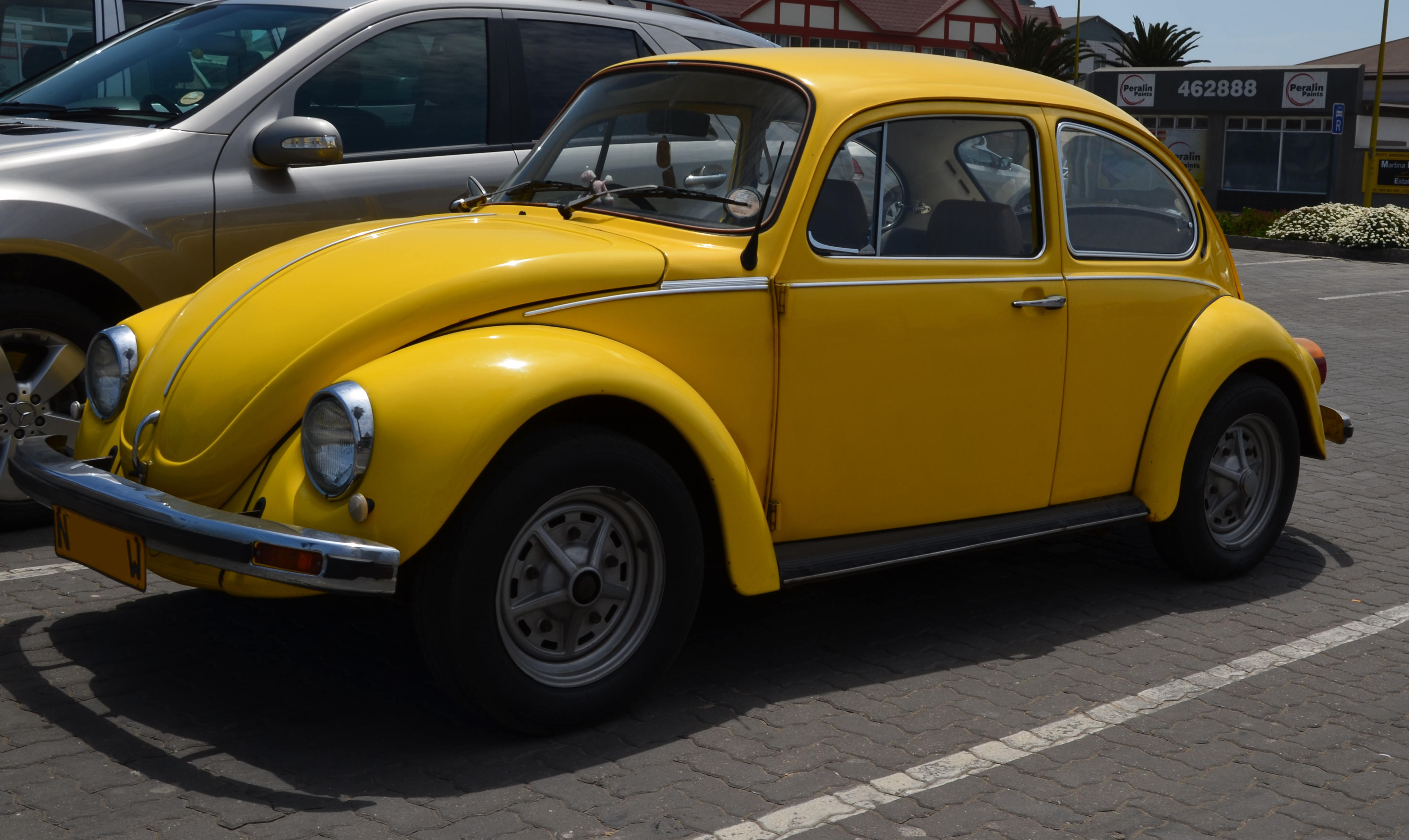 VW 1600S aus Südafrika